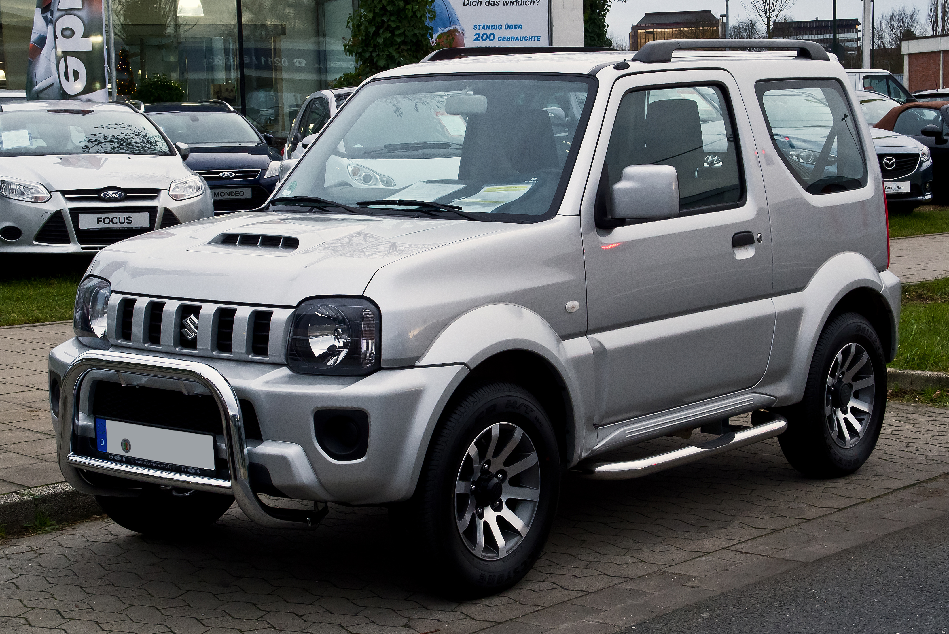 Suzuki Jimny 1.3 Club (2. Facelift)